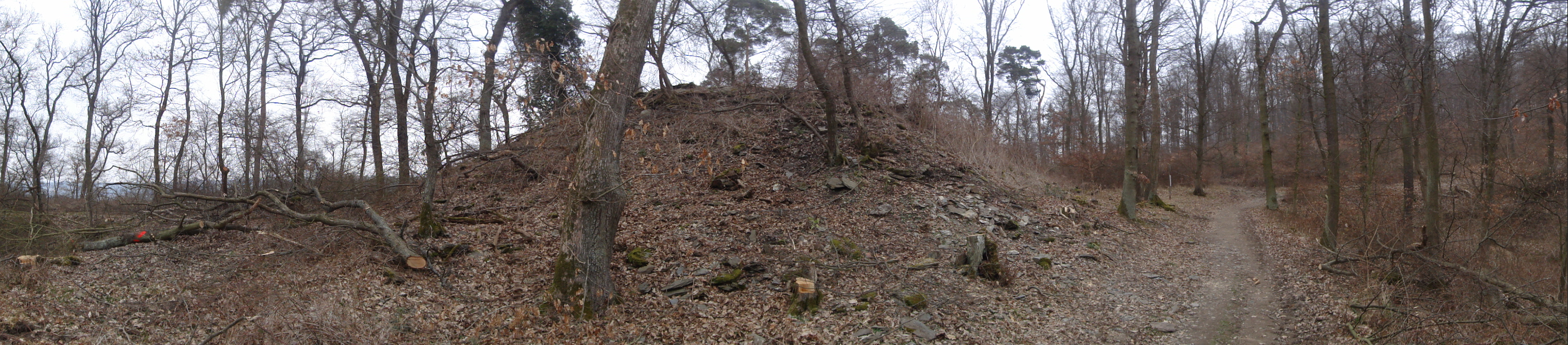 Der Burghügel der Burg Herzogenstein bei Dörscheid